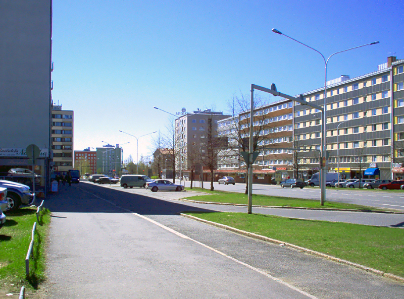 Tuiran keskustaa